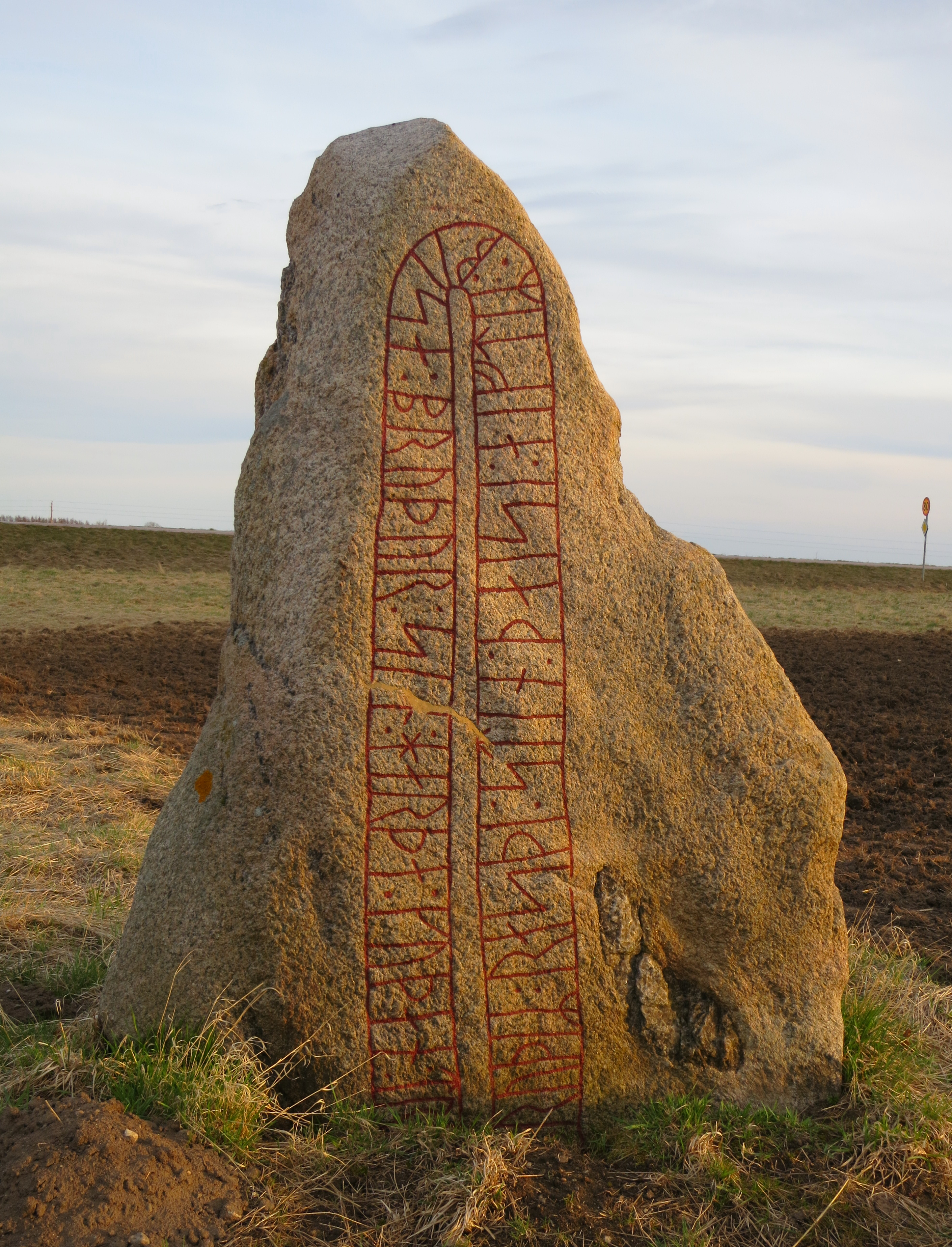 DR 268, Runsten i Östra Vemmenhög, Skåne